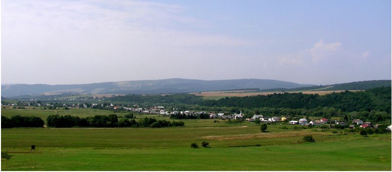 Celkový pohľad